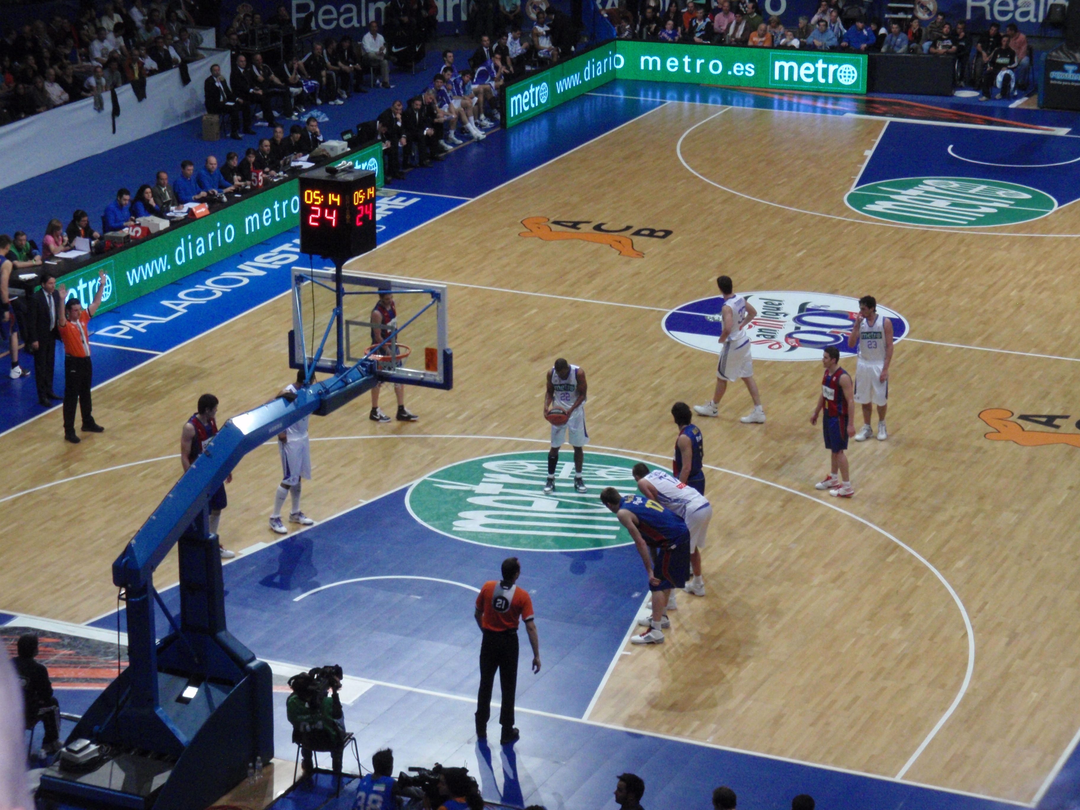 Louis Bullock.